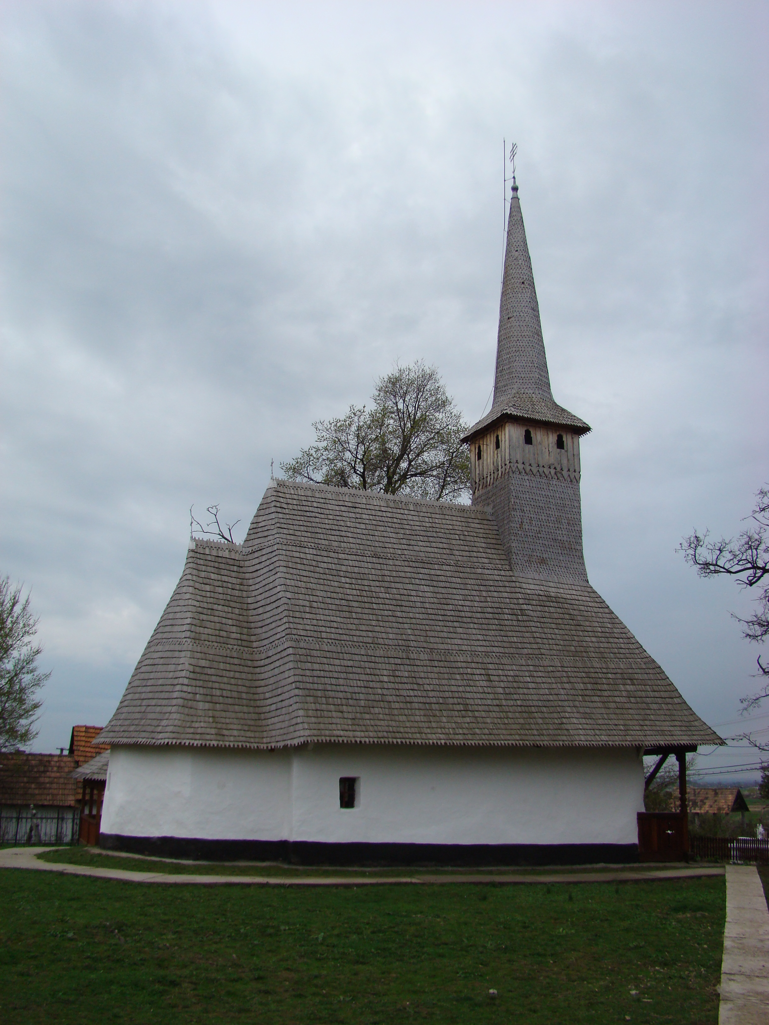 Biserica „Sfinții Arhangheli Mihail și Gavril” din Botean, județul Bihor